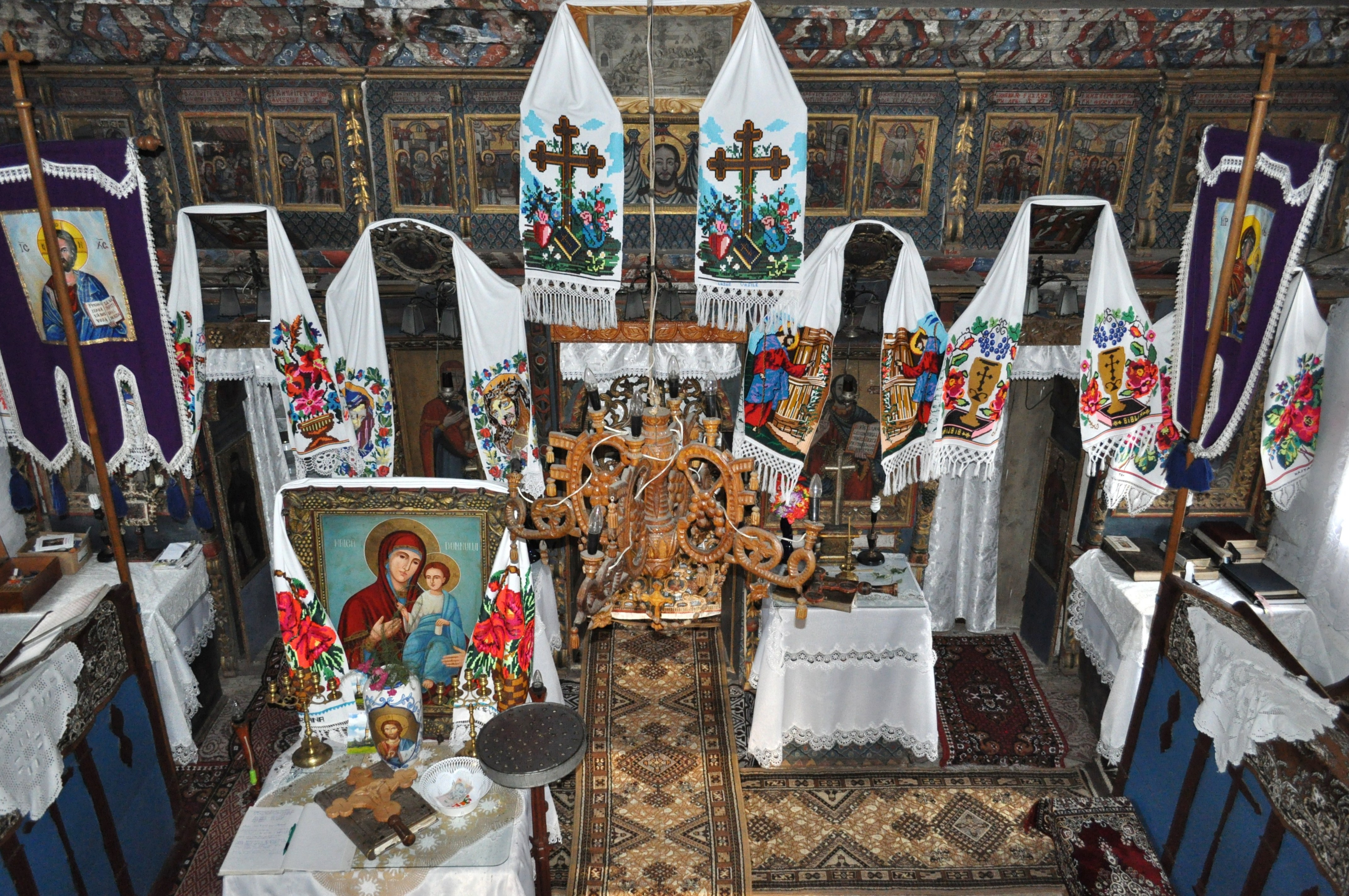 Biserica de lemn "Sfinții Arhangheli Mihail şi Gavril", sat PLOPIŞ; comuna ŞIŞEŞTI